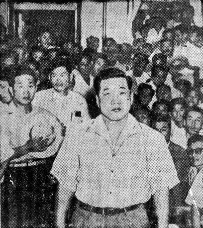 1955년 공판에서 김두한. 공판을 보기위해 모여든 인산인해한 방청석들.